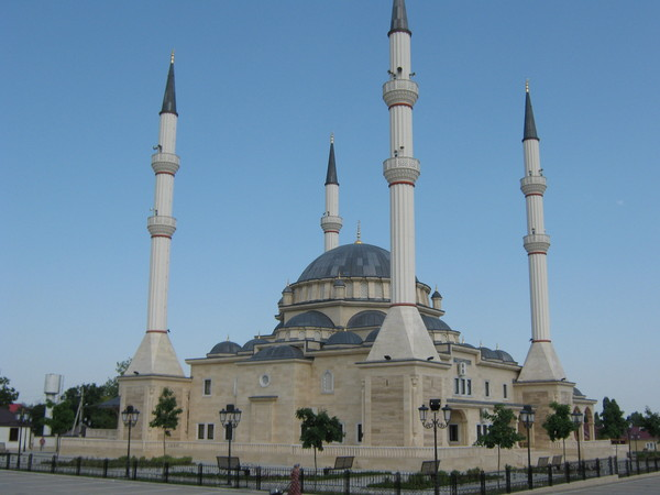 Мечеть, расположенная в Курчалое